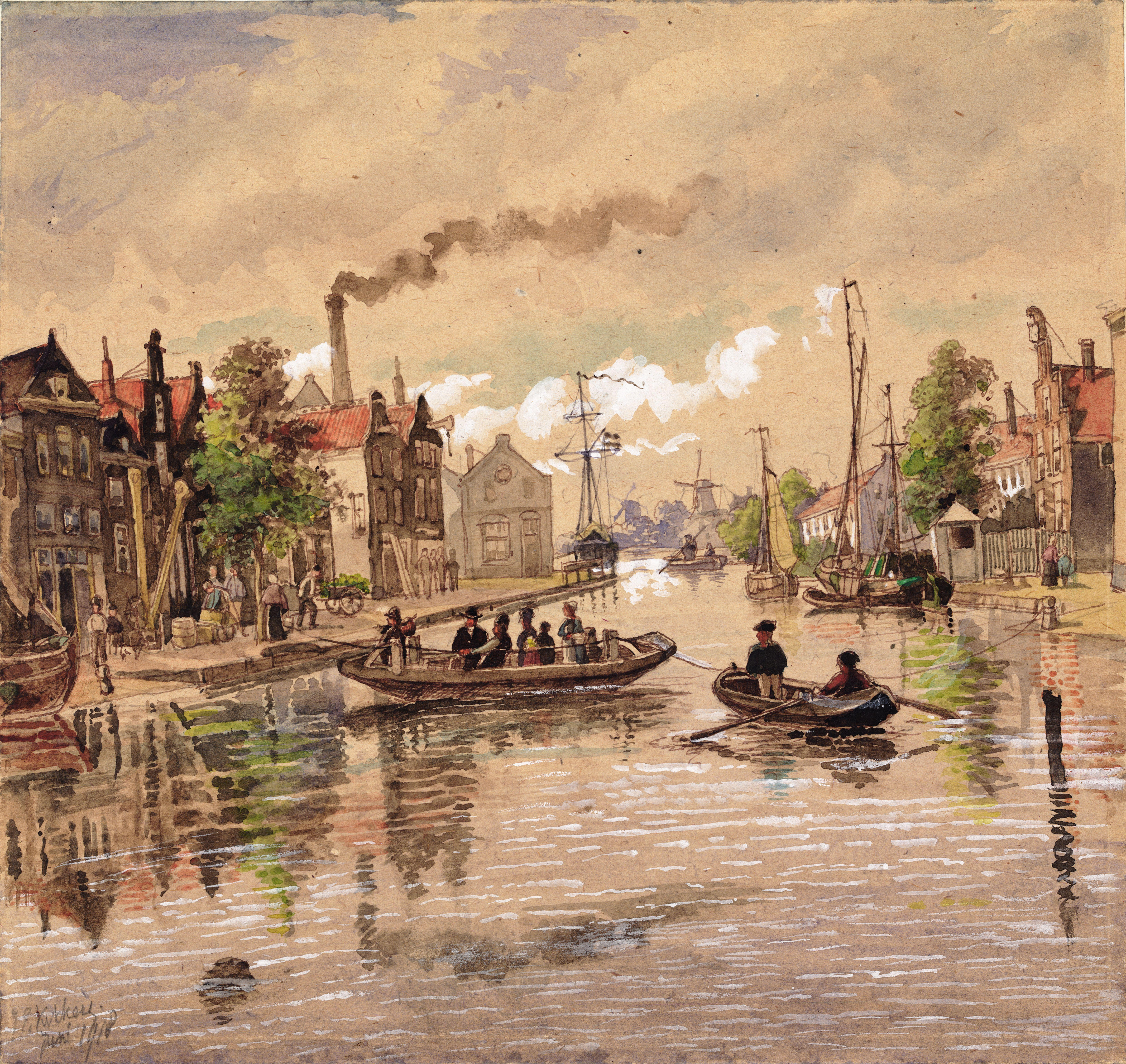 Het Galgewater met pontveer rond 1916 - Jan Elias Kikkert